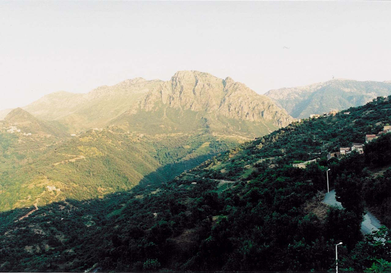 Image prise à partir du village d'Ait-Daoud en Kabylie (Algérie). On voit les montagnes du Djurdjura.